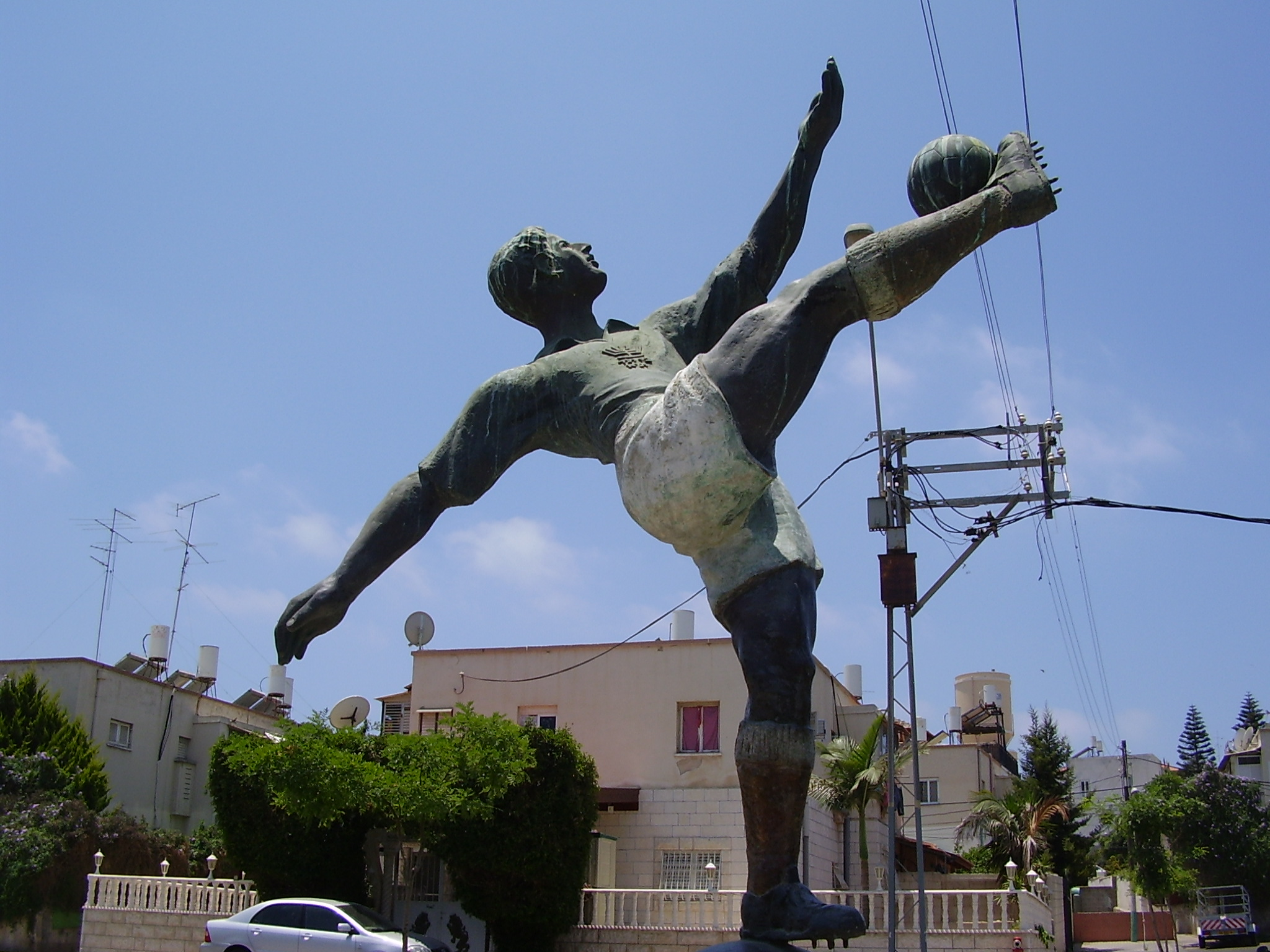 פסל נתן פנץ